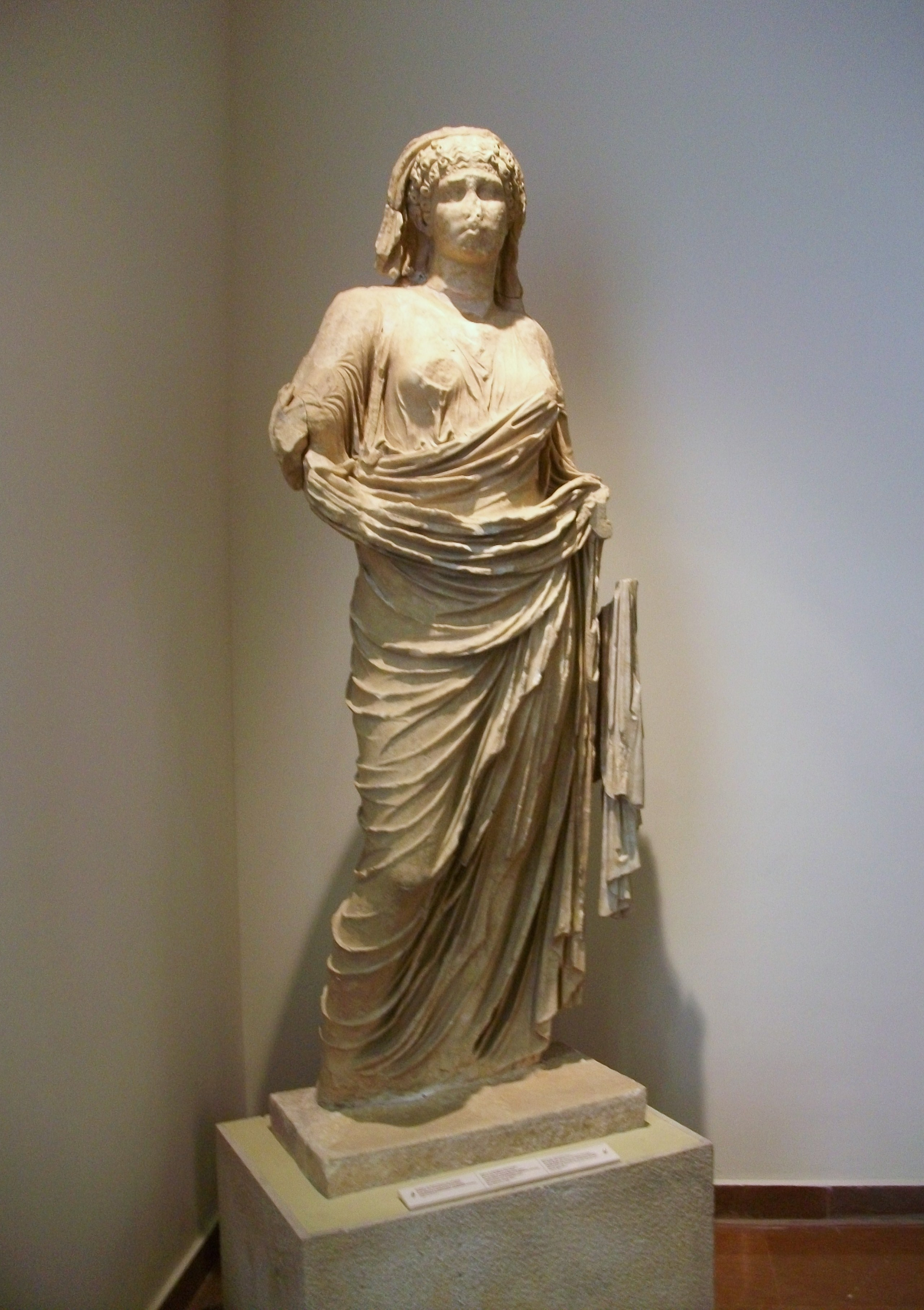 Estàtua d'Agrippina Minor, museu arqueològic d'Olímpia. En la base hi ha una inscripció que diu: Dionís, fill d'Apol·loni, atenenc, l'ha realitzada.